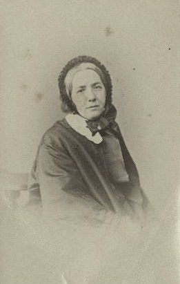 Зинаида Егоровна Кейзерлинг, ур. Канкрина (1821—1891), фрейлина, с 1844 года жена графа Александра Андреевича Кейзерлинга (1815—1891).